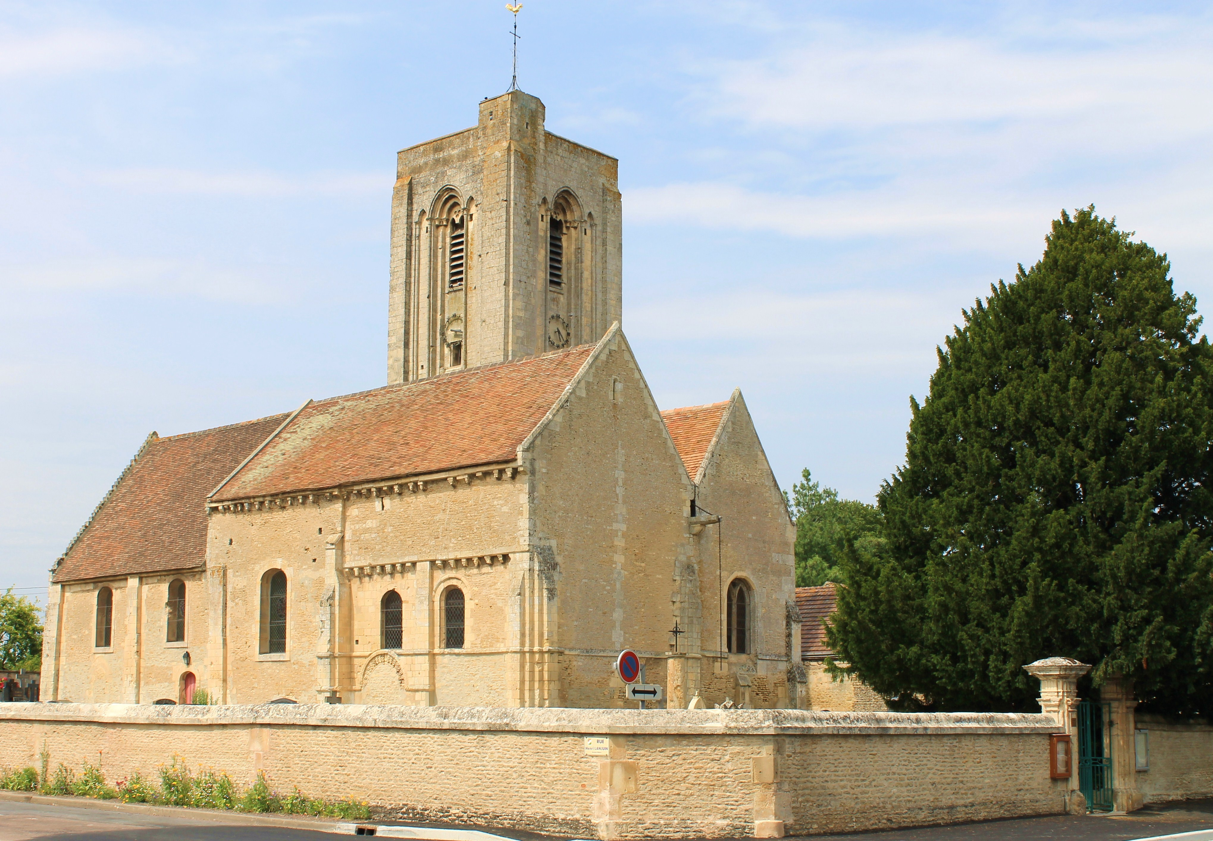 Eglise Notre-Dame à Cuverville, Calvados